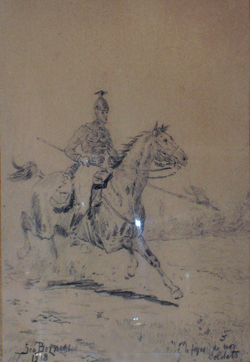 "Pour le foyer de nos soldats" (1918) - tekening van een huzaar door Géo Bernier (1862-1918); privé bezit